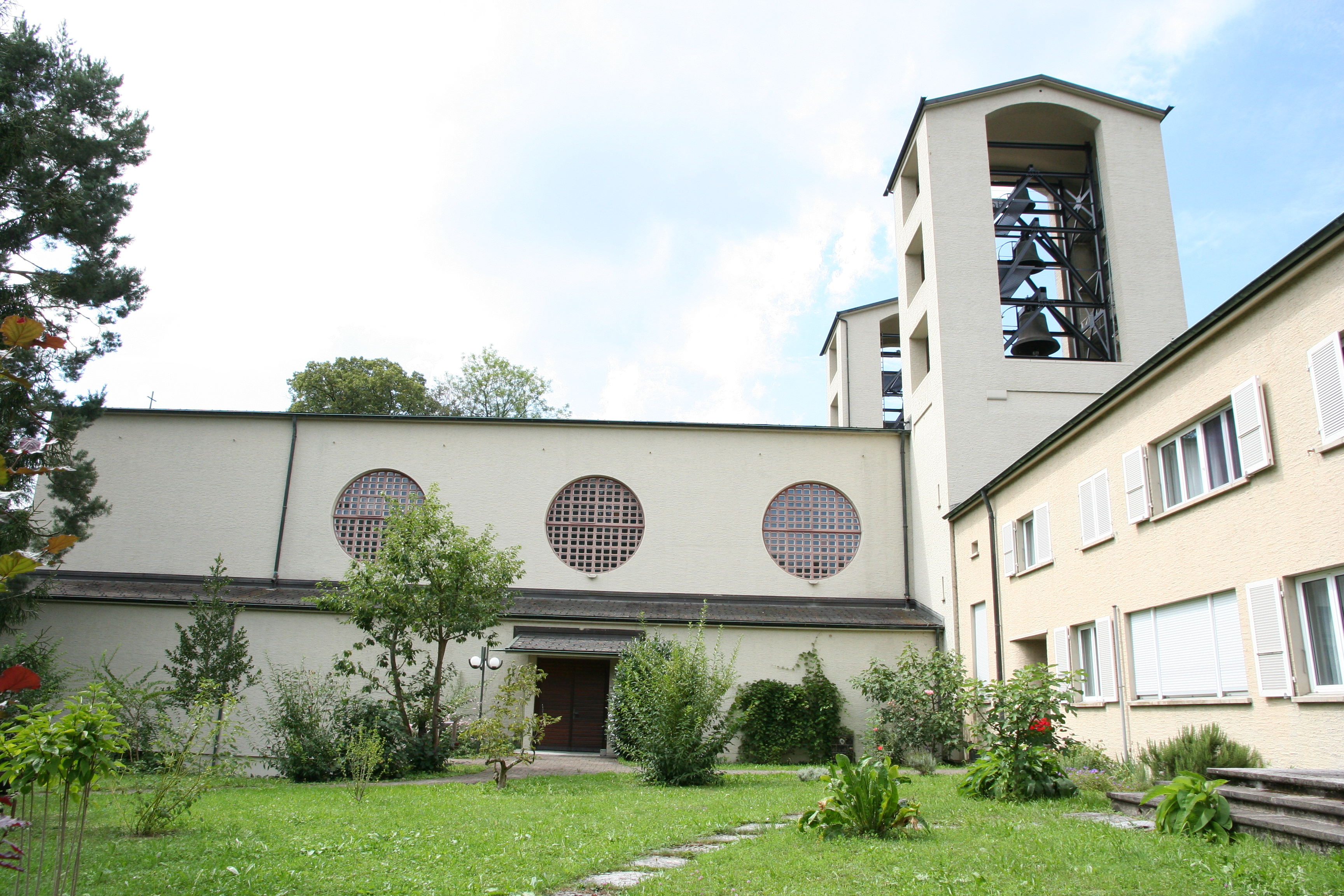 Römisch-katholische Pfarrkirche Maria Himmelfahrt Schönenwerd SO